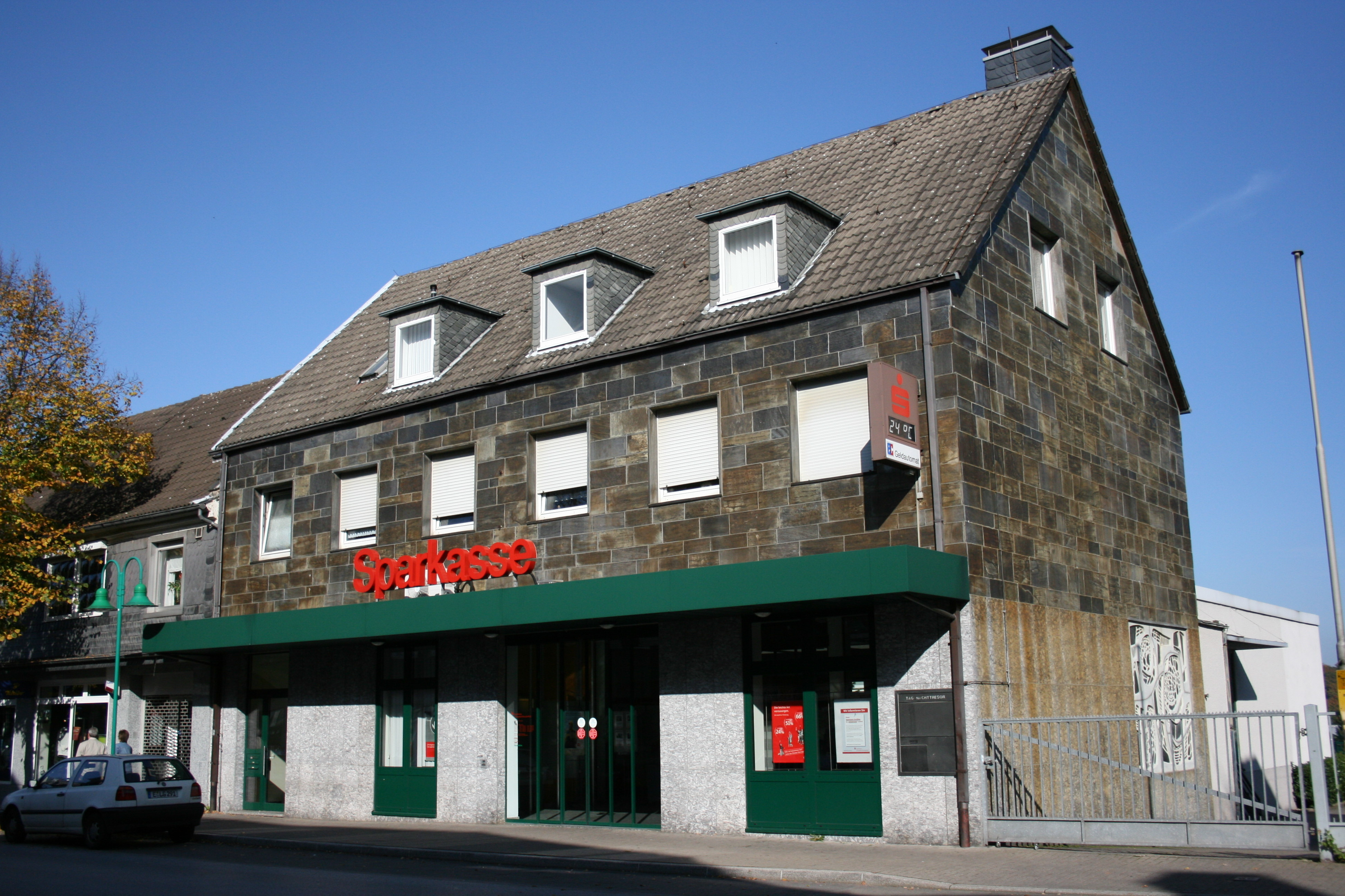 Lindenstraße in Ennepetal-Voerde